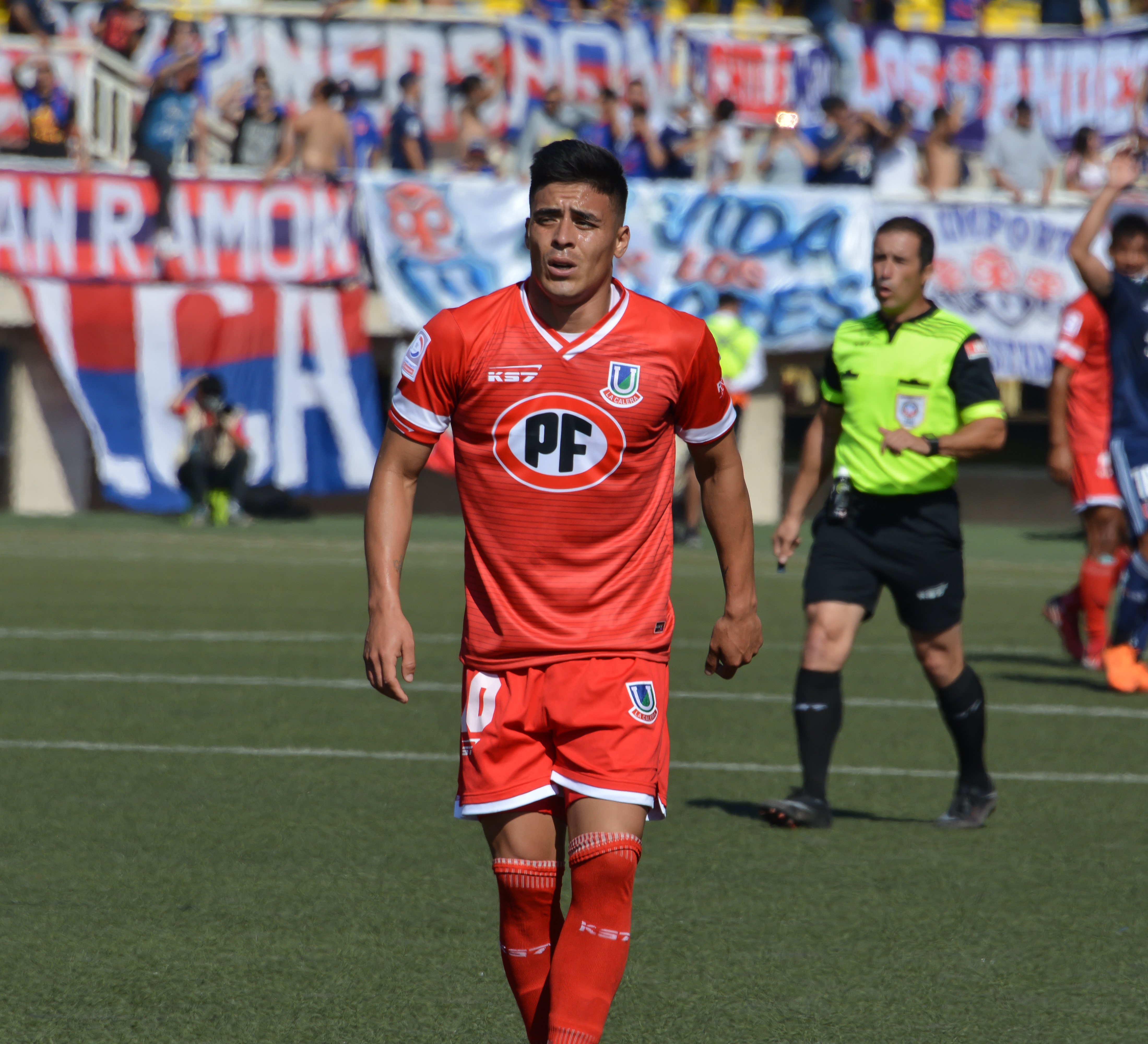 Unión La Calera v Universidad de Chile, Estadio Municipal Lucio Fariña Fernández, Quillota, Chile.